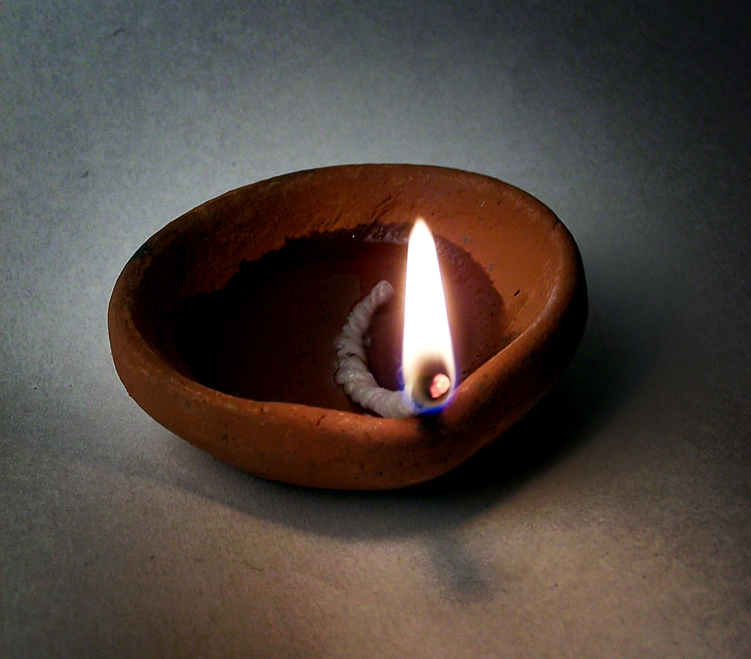 A diya - Indian oil lamp.